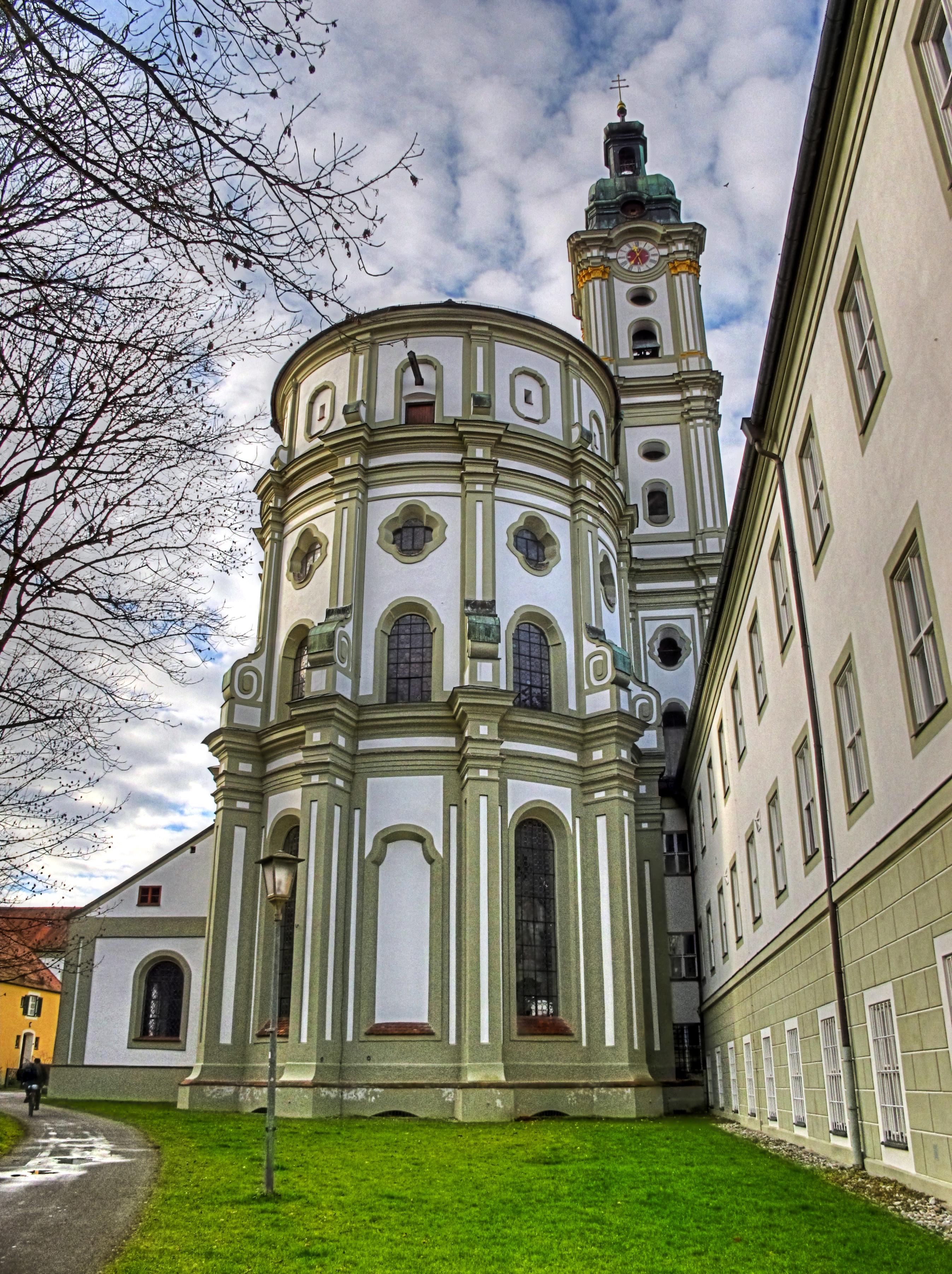 Deutschland, Bayern, Oberbayern, Landkreis Fürstenfeldbruck, Fürstenfeldbruck, Kloster Fürstenfeld, ehemalige Klosterkirche Mariä Empfängnis